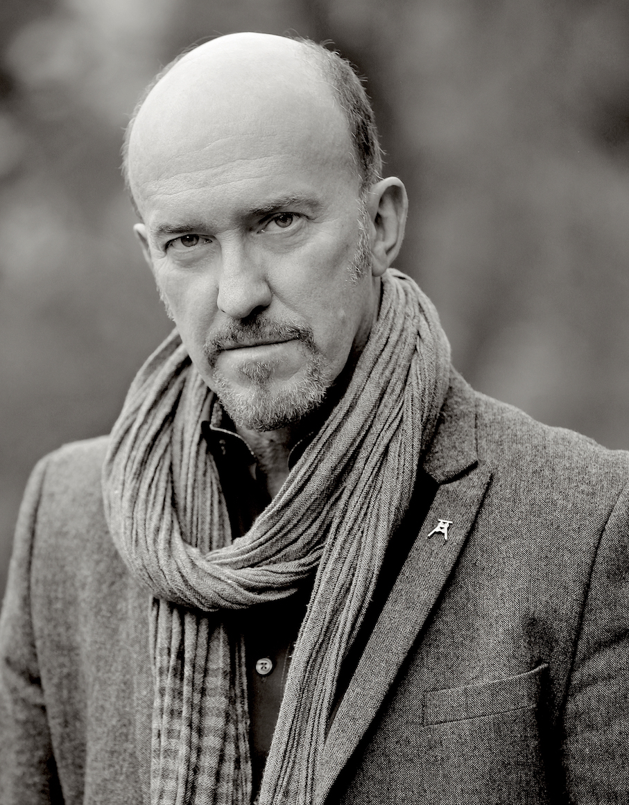 Porträt Peter Nottmeier